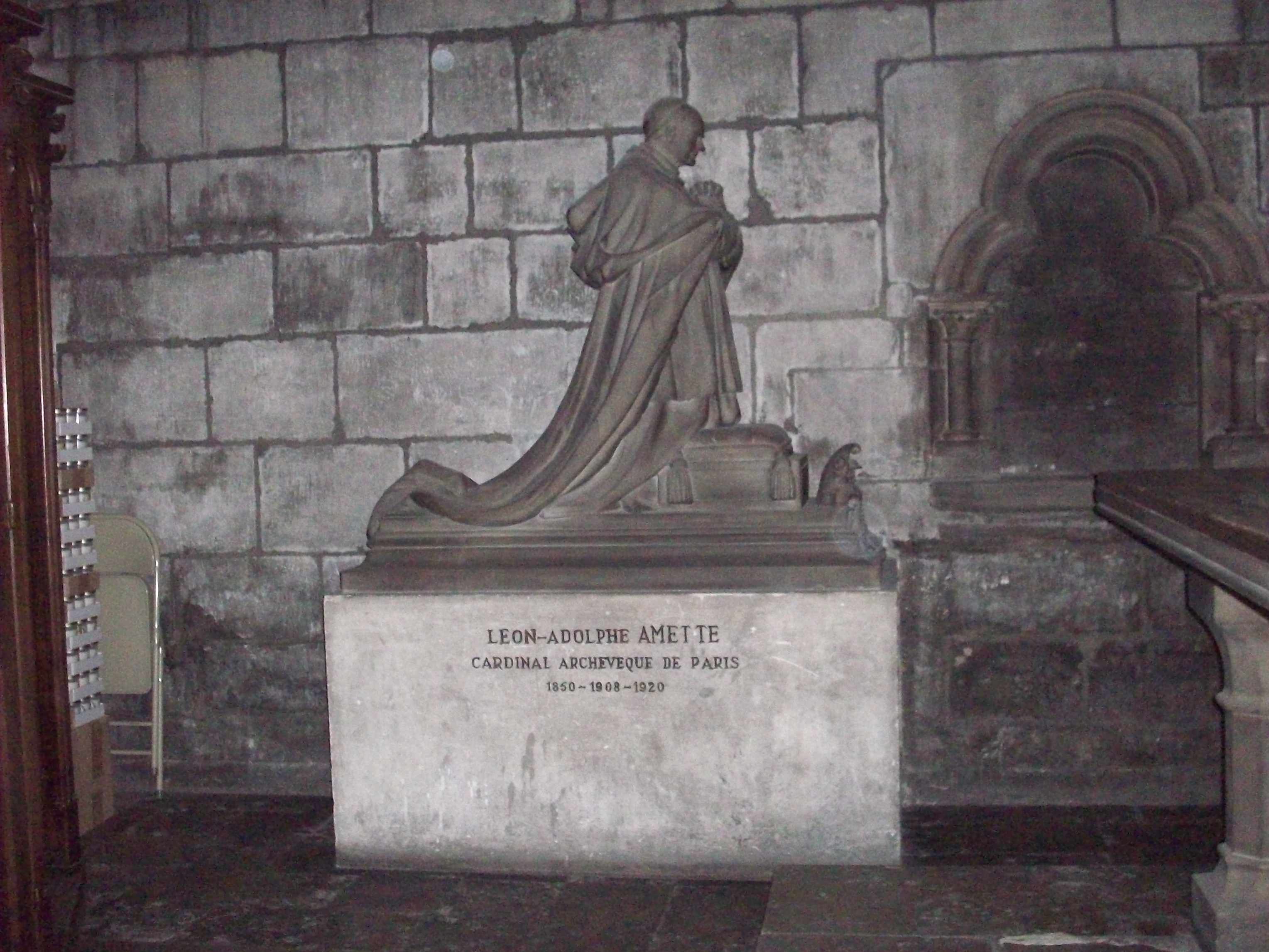 Orant de Léon-Adolphe Amette (1850-1920), évêque de Bayeux puis archevêque de Paris, cardinal, dans la chapelle Saint-Vincent-de-Paul. Œuvre du sculpteur Hippolyte Lefèbvre réalisée en 1923.